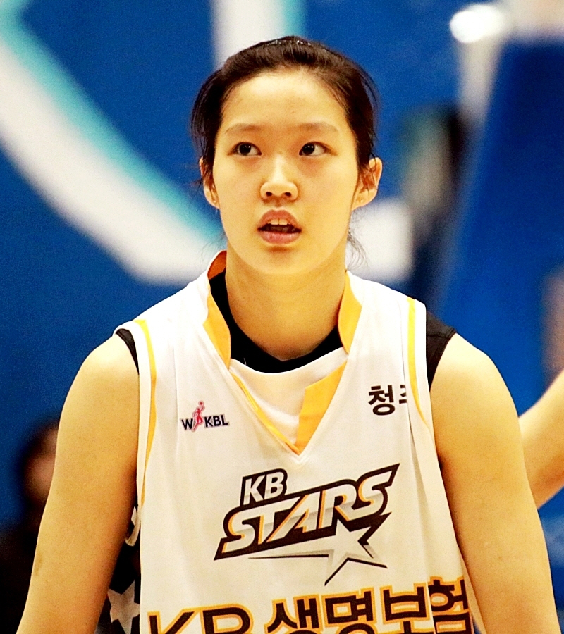 160220 여자농구 KDB생명 vs KB스타즈 직찍